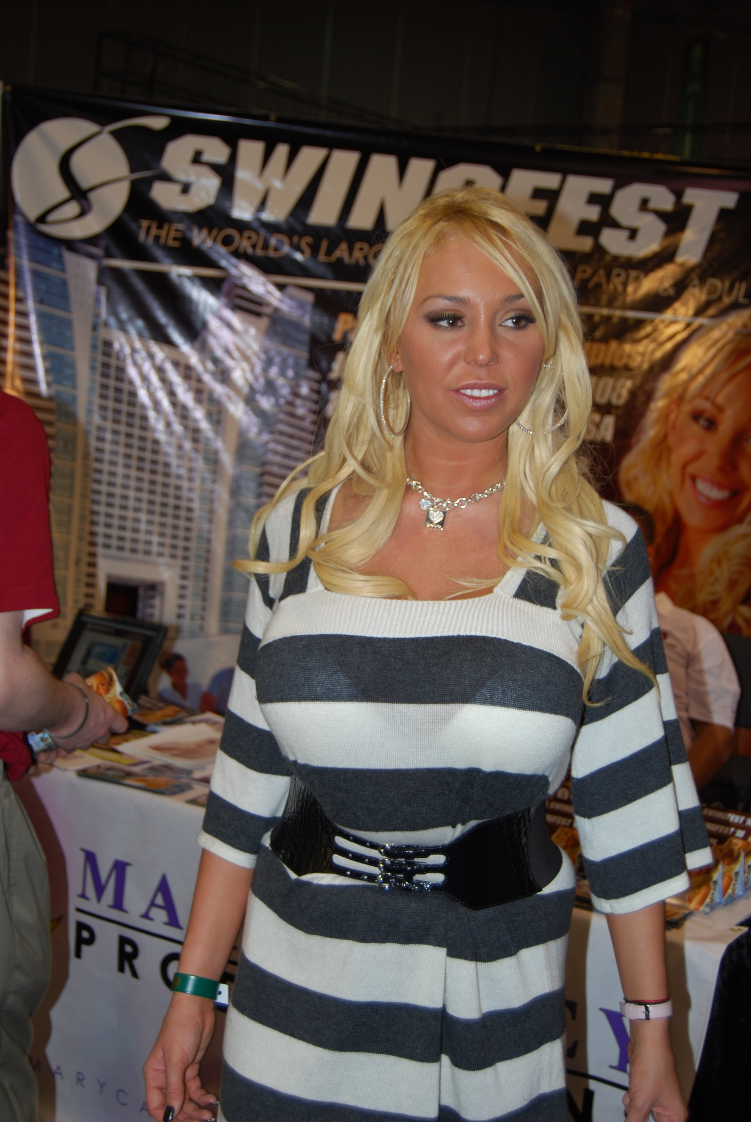 AEE2008_Nikon_Day1 414